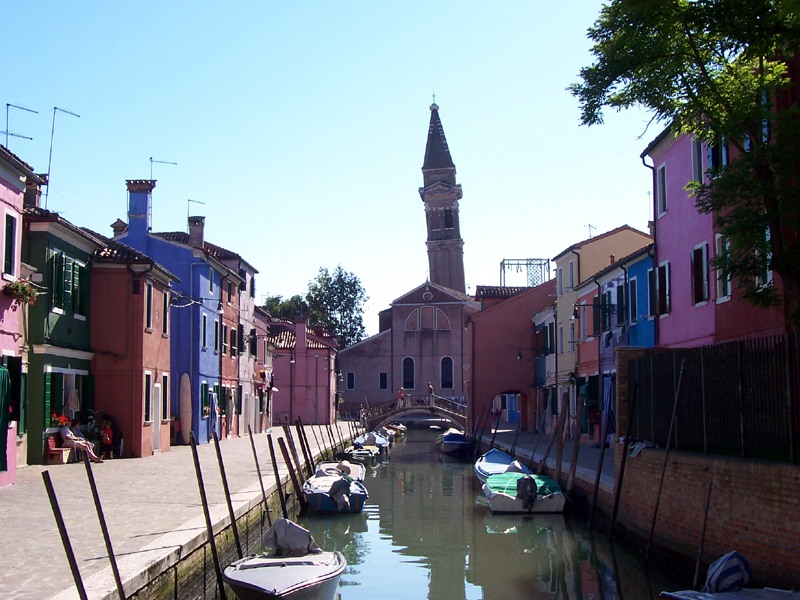 Burano - Fondamenta Terranova e Chiesa di S. Martino